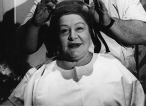 Celia Geraldy- actriz y vedette